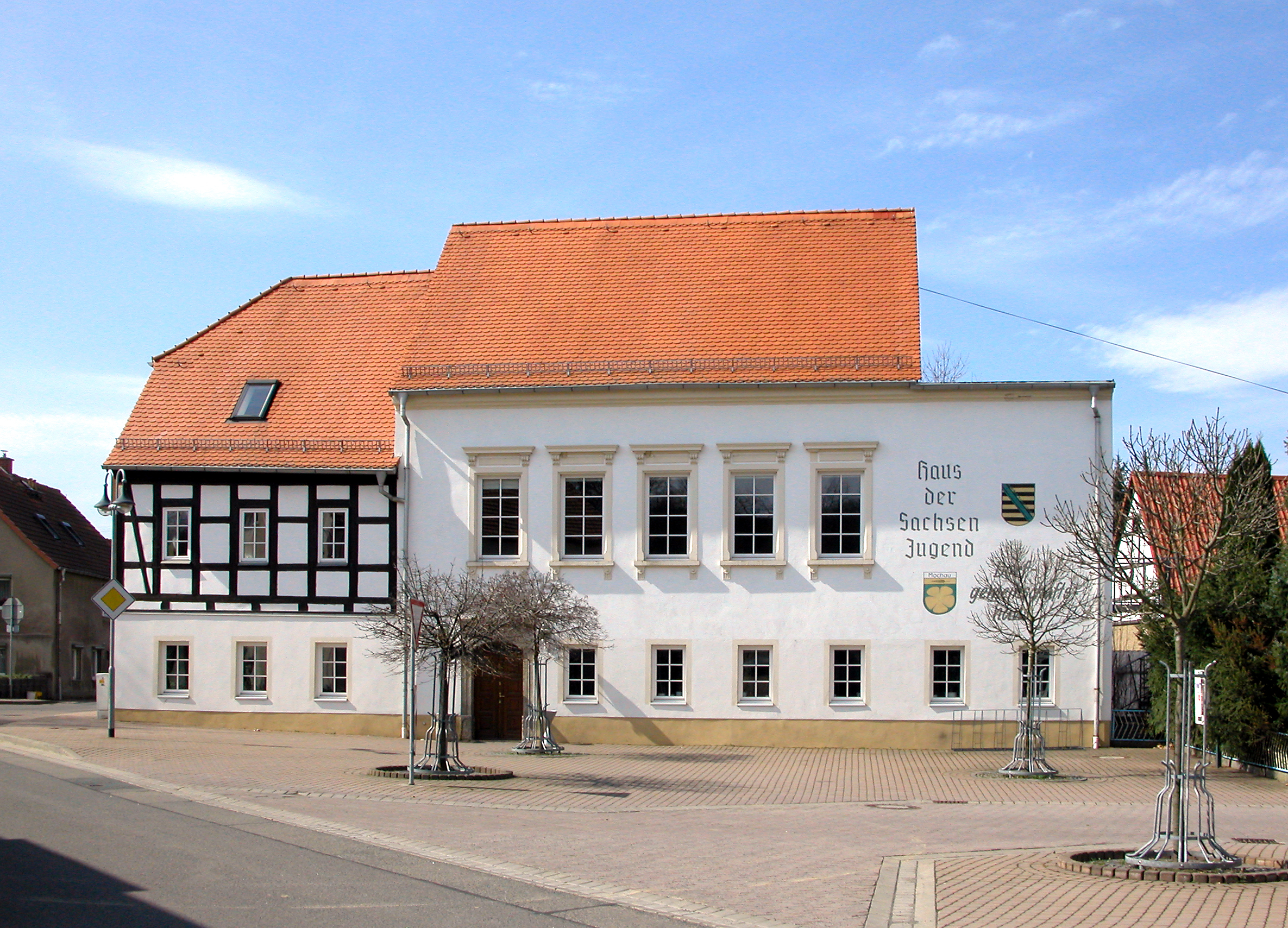 30.03.2010 04720 Mochau (Döbeln): Dorfgemeinschaftshaus Mochau "Haus der Sachsen Jugend". Am Dreieck, Meißner Straße (GMP: 51.134913,13.187000). [DSCN40628.TIF]20100330060DR.JPG(c)Blobelt